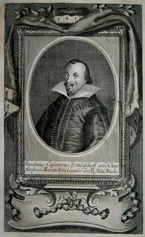 Anselm Casimir Wambolt von Umstadt, (1579 - 1647): im Textteil: "Anselmus Casimirus Ertzbischoff und Churfürst zu Maintz Ertz Cantzler des Hl. Röm Reichs", von 1629 bis 1647 Kurfürst und Erzbischof von Mainz, Erzkanzler des Heiligen Römischen Reiches